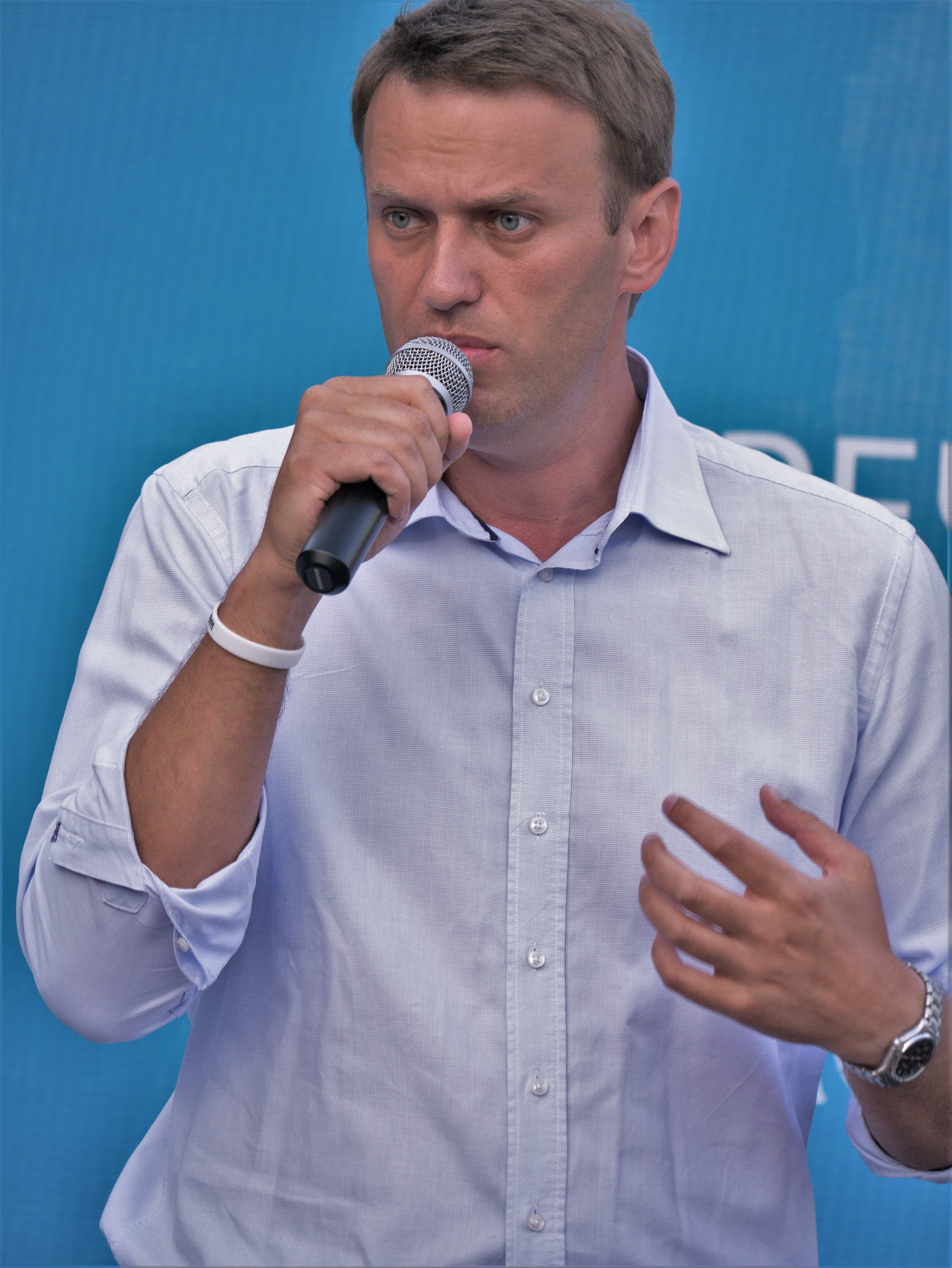 Встреча с избирателями на выборах мэра Москвы 2013 года